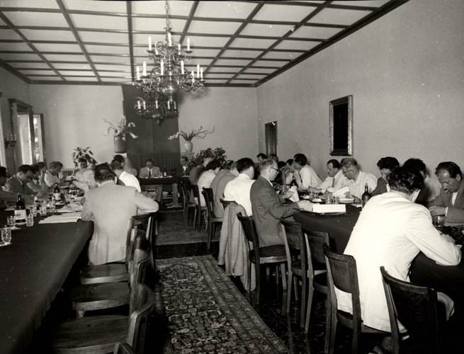 Sednica Saveznog izvršnog veća na Brionima